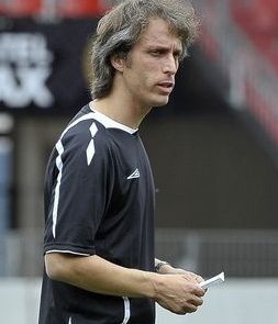 Christophe Moulin en pleine activité